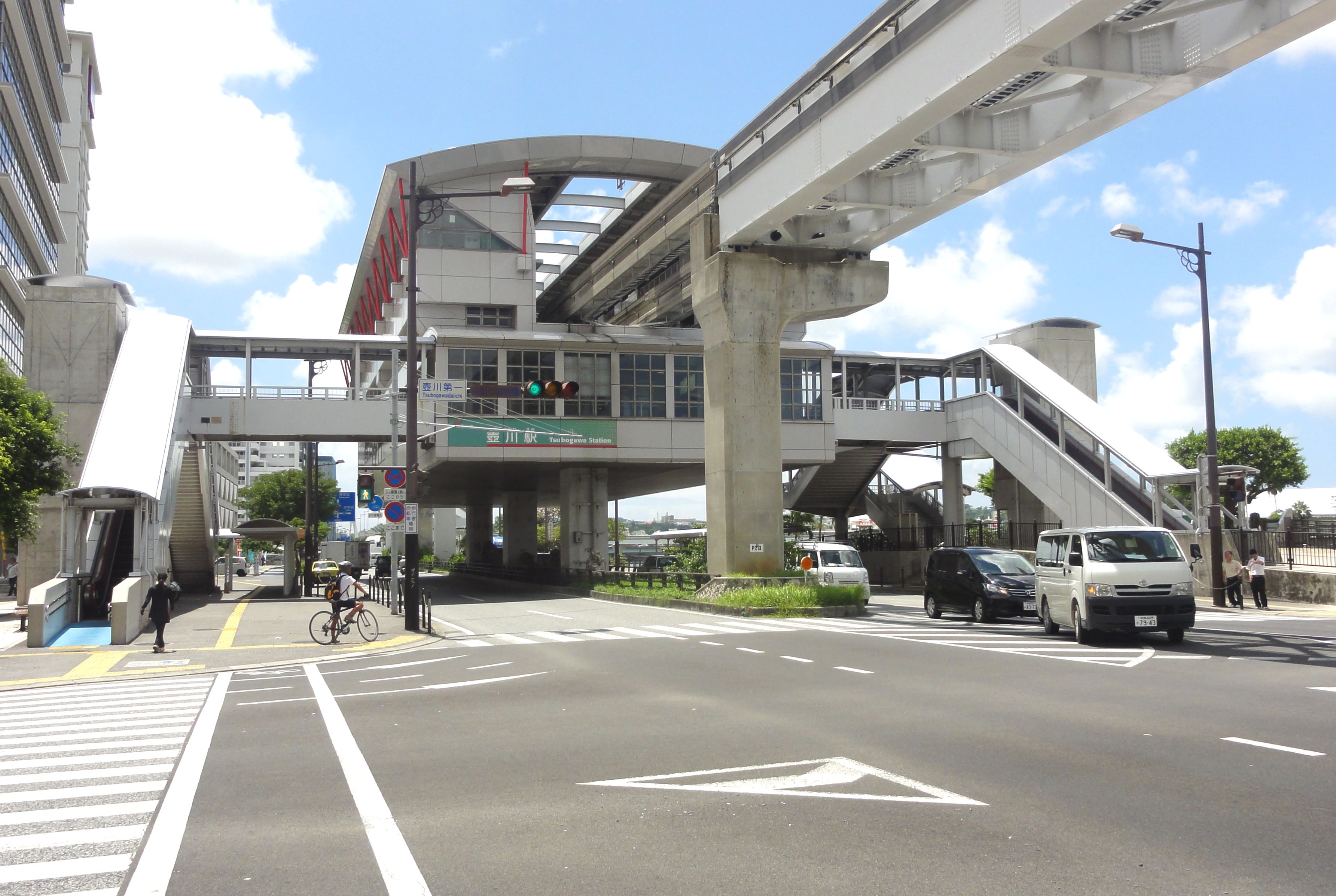 沖縄都市モノレール壺川駅